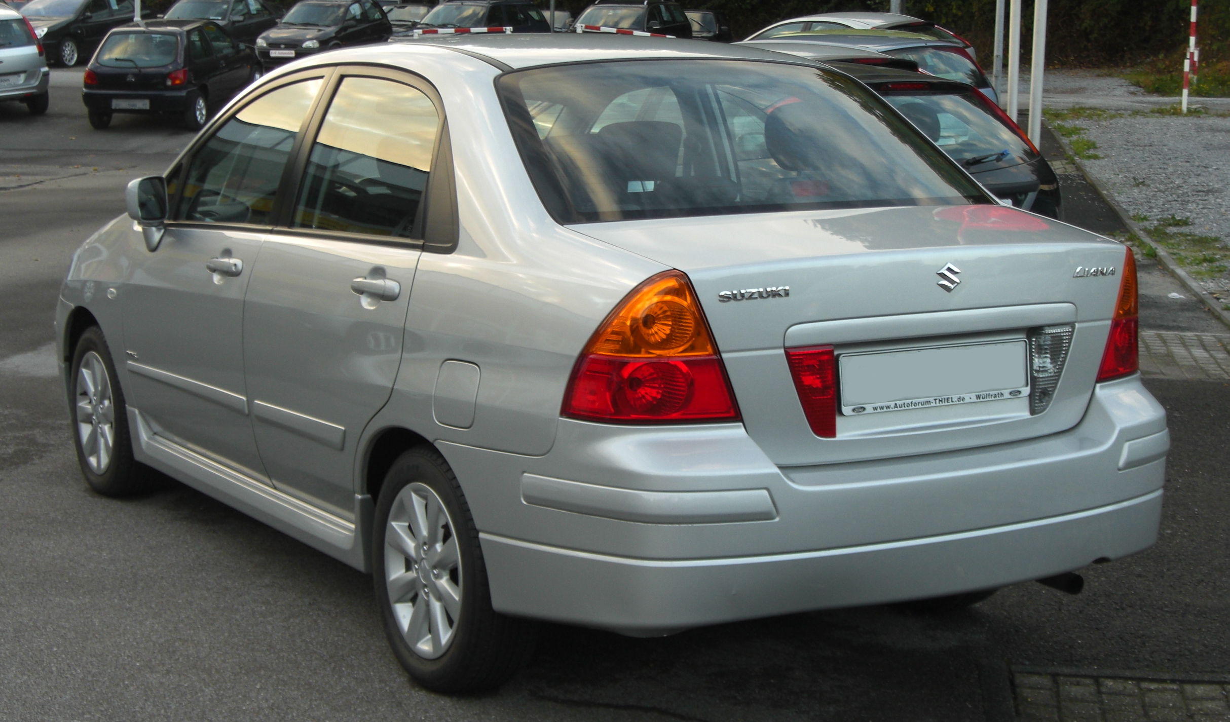 Suzuki Liana Facelift